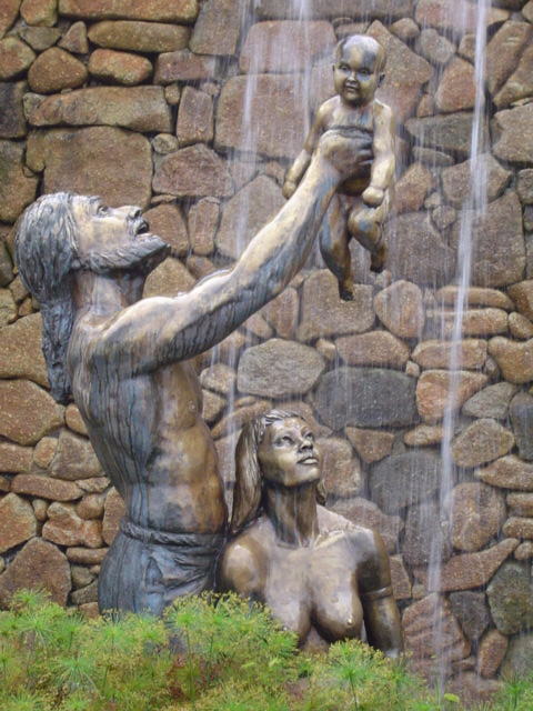 Monumento aos Bandeirantes, instalado no acesso ao Centro Histórico de Santana de Parnaíba SP - Nascimento Caboclo